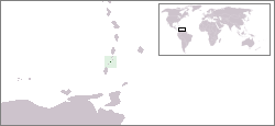 Description:Carte de localisation de Canouan, Saint-Vincent et les Grenadines Auteur:Rémih à partir d'une carte du CIA WorldFactBook